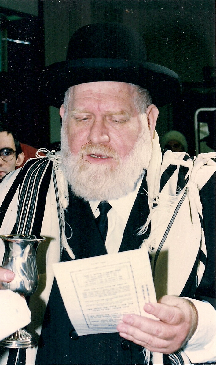 הרב שמחה מירון